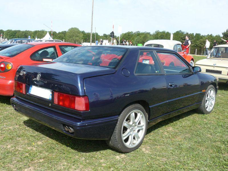 Montlhery2012